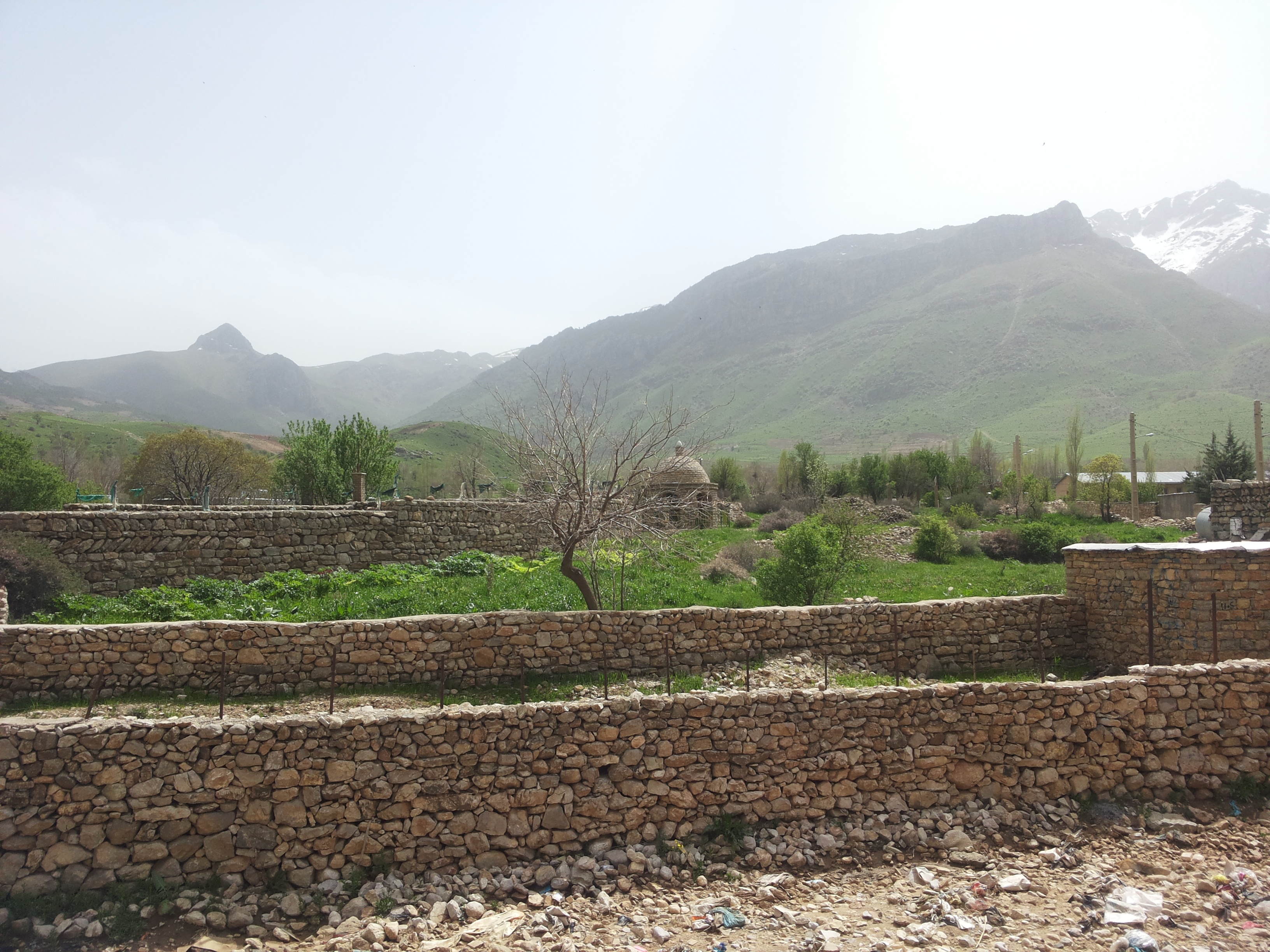 کوردی: گۆڕی مەلا حەسەن دزڵی لە پاڵ زیارەتەڵانی ئەسحابەدا